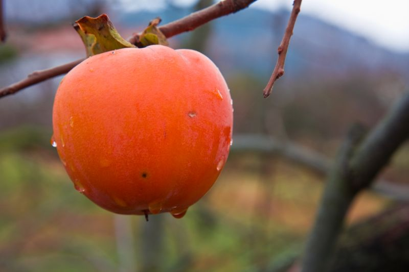 Khaki fruit